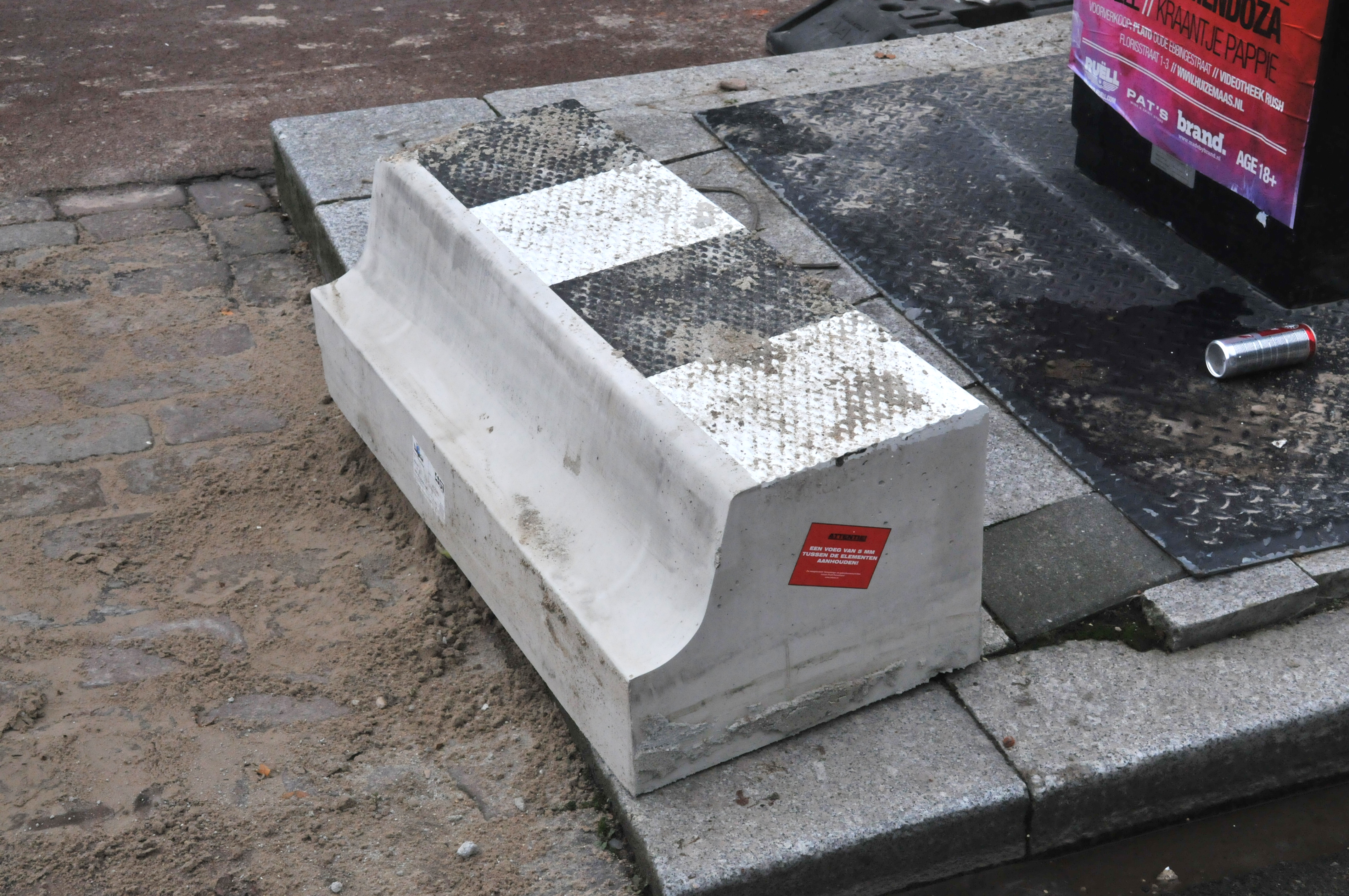 Wielgeleidende trottoirband te Groningen. De hoogte van de geleidende trottoirrand is in Nederland vastgesteld op 18 centimeter. De meeste haltes bij tram- en HOV-lijnen zijn of worden daarom verhoogd naar ongeveer 30 centimeter.